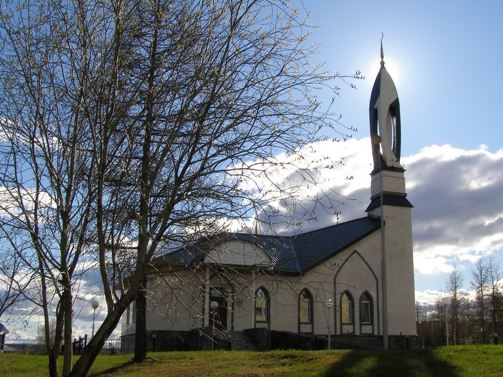 Надымская мечеть